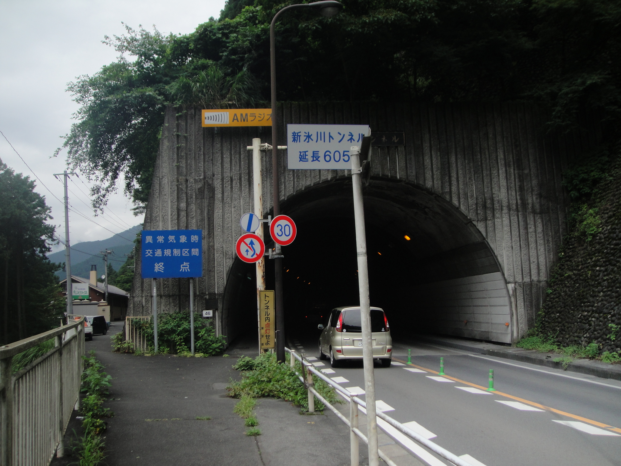 新氷川トンネル